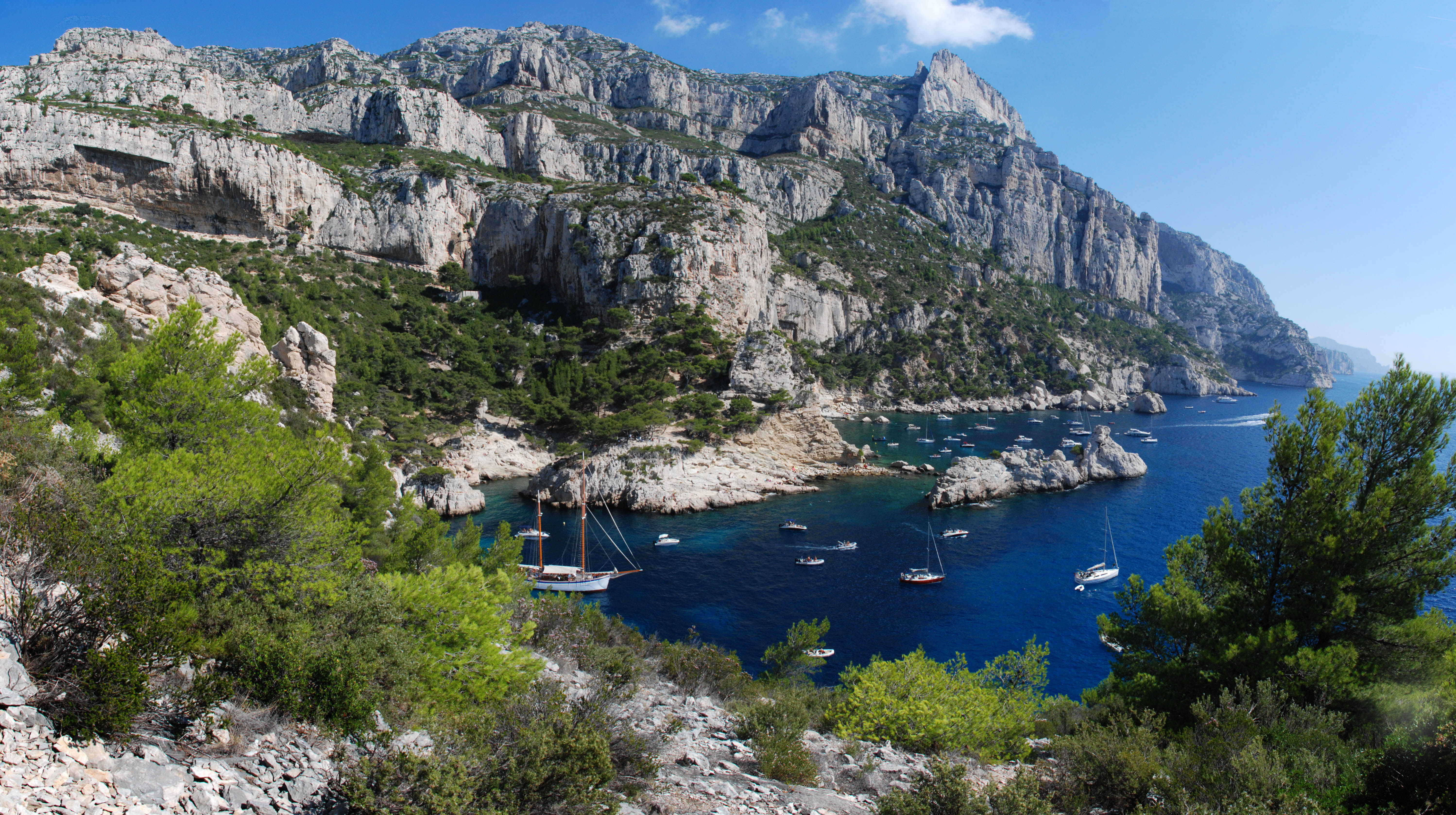 récompense après 3 heures de marche, et quelques bains.